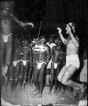 السيد صلاح سالم يرقص مع القبائل السودانية شبه عارى